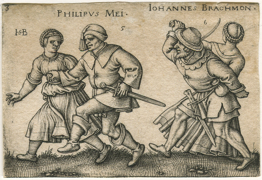 Beham, (Hans) Sebald (1500-1550): Die Monate Mai und Juni (The Peasants’ Feast: The Twelve Months of the Year: May and June). Kupferstich/engraving. 5 X 7.3 cm. B.156, Pauli, Holl. 179 II (of III: retouched by a later hand). “Vor den zusätzlichen Schraffuren im Terrain. Ganz ausgezeichneter, klarer Druck partiell mit der Einfassungslinie, sonst minimal knapp innerhalb dieser geschnitten. Verso unbedeutend fleckig, sonst sehr schön erhalten.